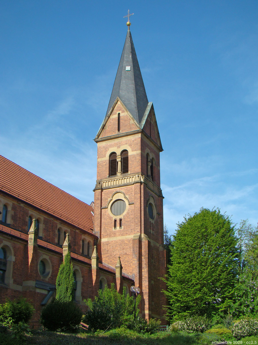 Turm der kath. Kirche St. Kilian in Heilbronn-Böckingen